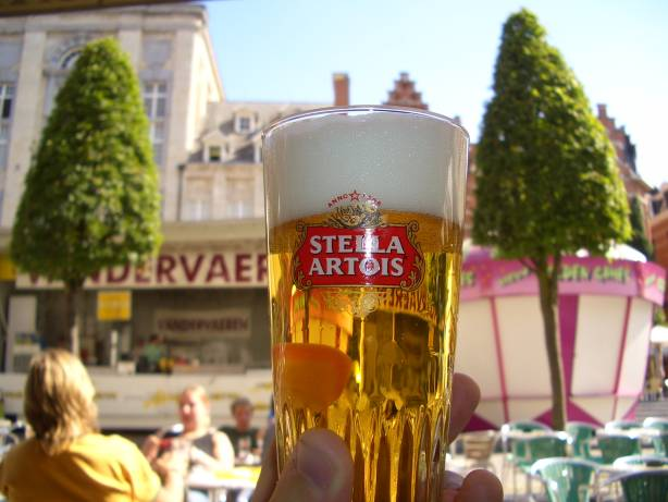 Zelf getrokken foto, vrij van auteursrechten Categorie:Afbeelding bier